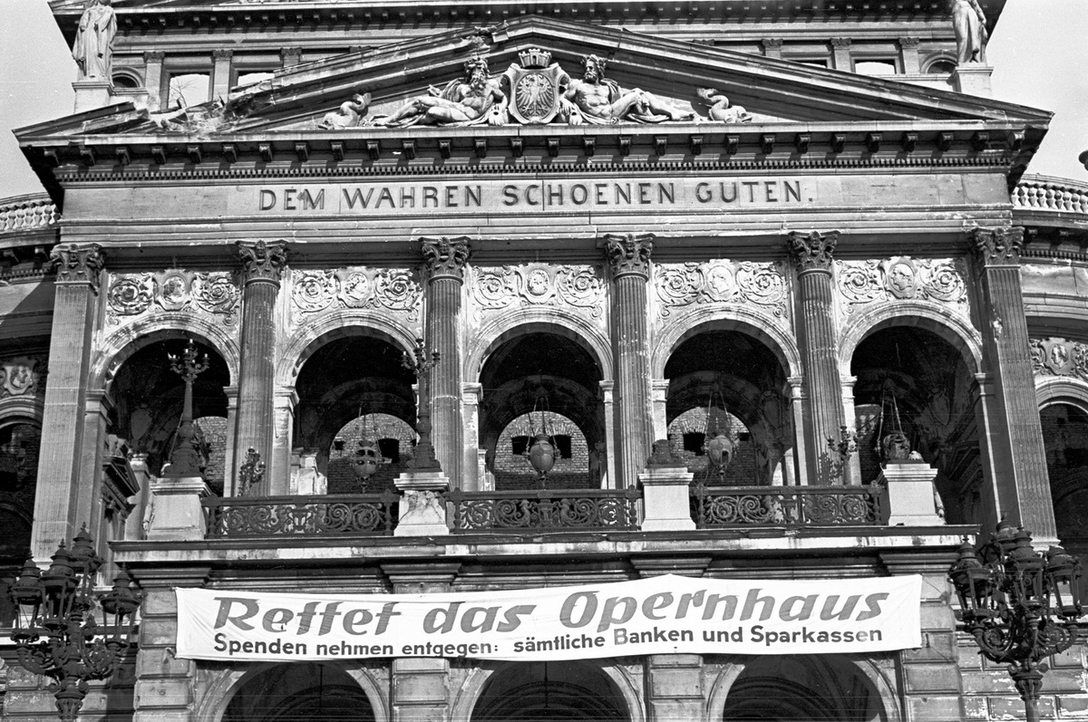 Spruchbanner an der Ruine der Alten Oper Frankfurt: "Rettet das Opernhaus", ein Spendenaufruf der gleichnamigen Bürgerinitiative, Aufnahme aus den 1950er Jahren